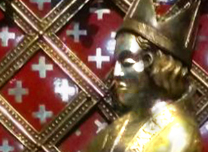 Berenguer de Cruïlles, bisbe de Girona i primer president de la Generalitat de Catalunya, en el detall d'un relleu de la Catedral de Girona.